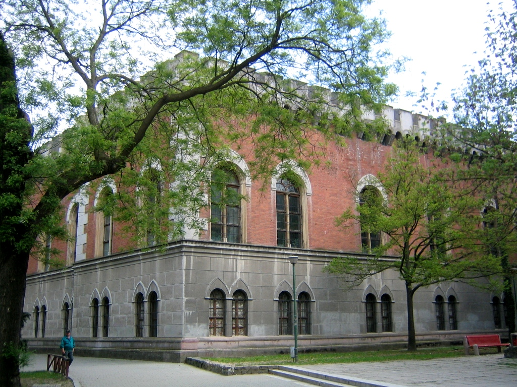 Huniade Castle, Timisoara, Romania